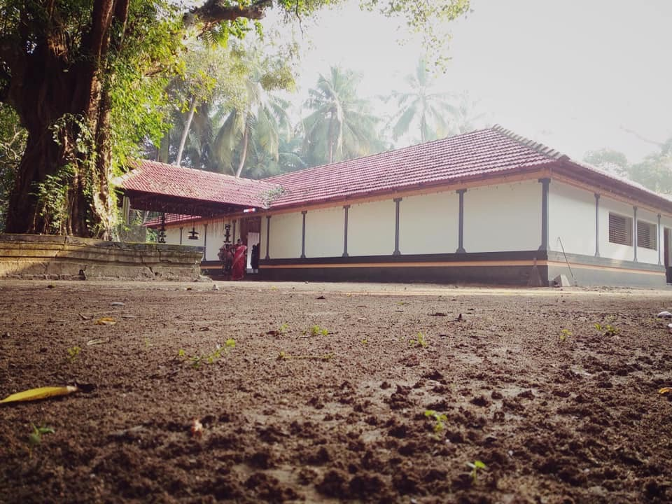 ശ്രീ ഭയങ്കാവ് ഭഗവതി ക്ഷേത്രം